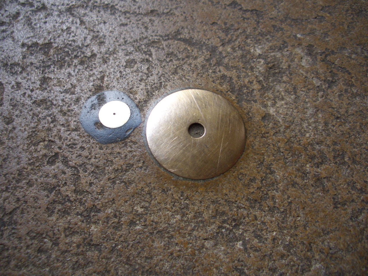 Friburger Minschter, Messingeiilossige im Fueßbode direkt unter em Glockedurm großi Iilossig: geometrischer Punkt senkrecht unter em Durmspitz glaini Iilossig: datsächlige Iischlagspunkt vun eme Gegenstand, wenn me ne direkt vum Durmspitz dät gheie losse (Grund: Erdrotation)